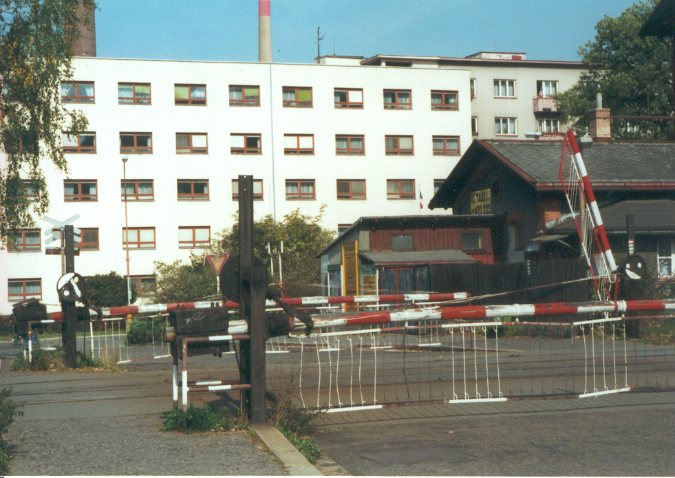 Náchod 2000